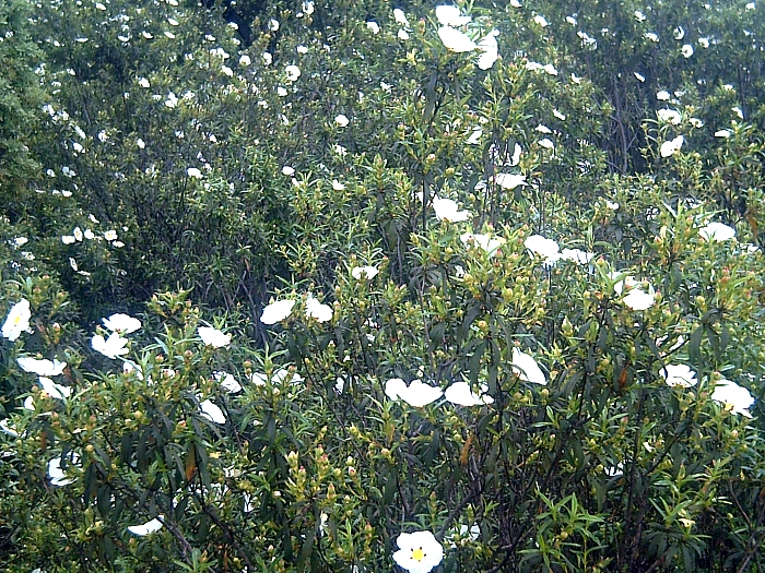 Cistus_ladanifer "Jara pringosa " in Sierra Madrona, Solana del Pino, Spain